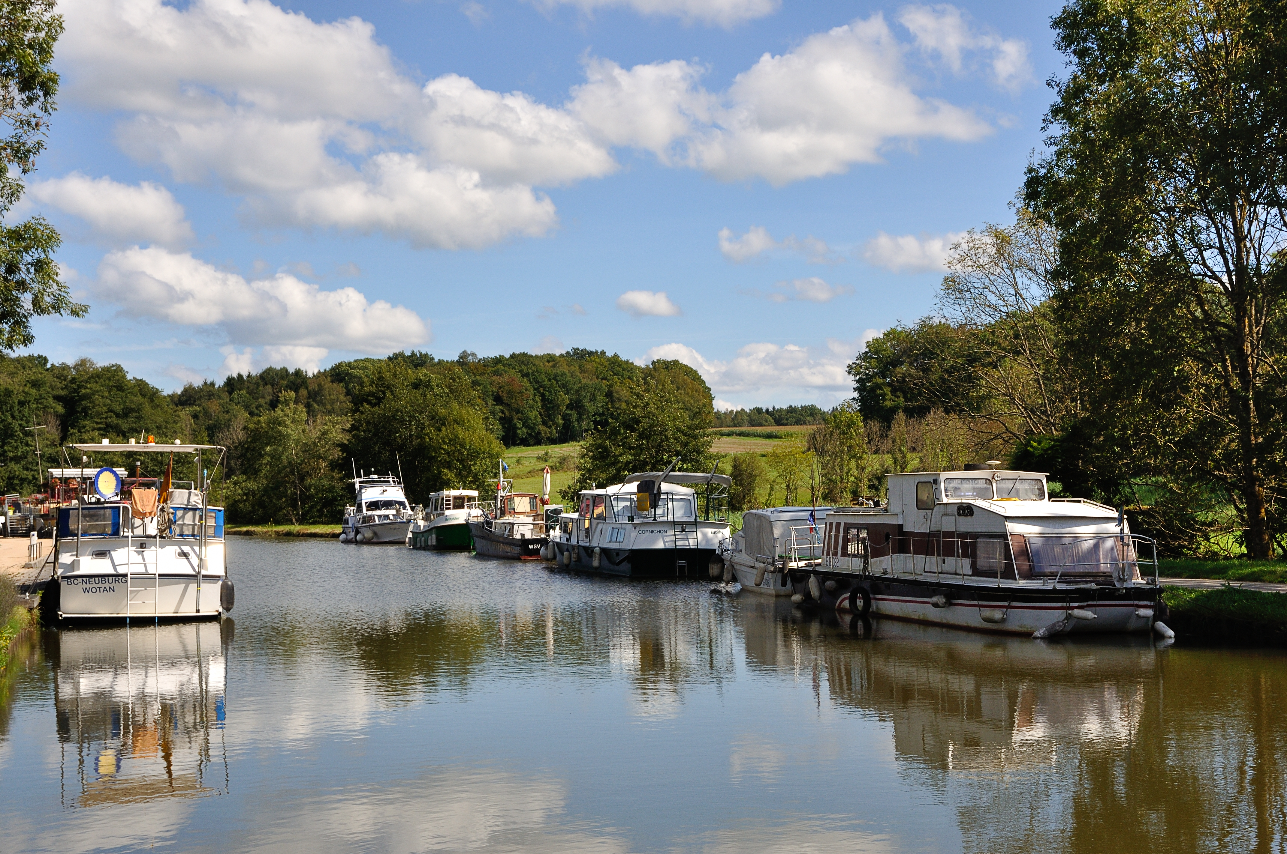 Port de plaisance sur le canal du Rhône au Rhin.